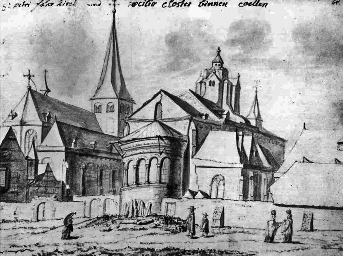 St. Peter und St. Cäcilien mit angrenzenden Klosterbauten. Justus Finkenbaum, Köln 17. Jahrhundert. Die Ansicht von Nordosten bezeichnete der Künstler als "s.petri fahr kirch und saecilia closter binnen coellen"